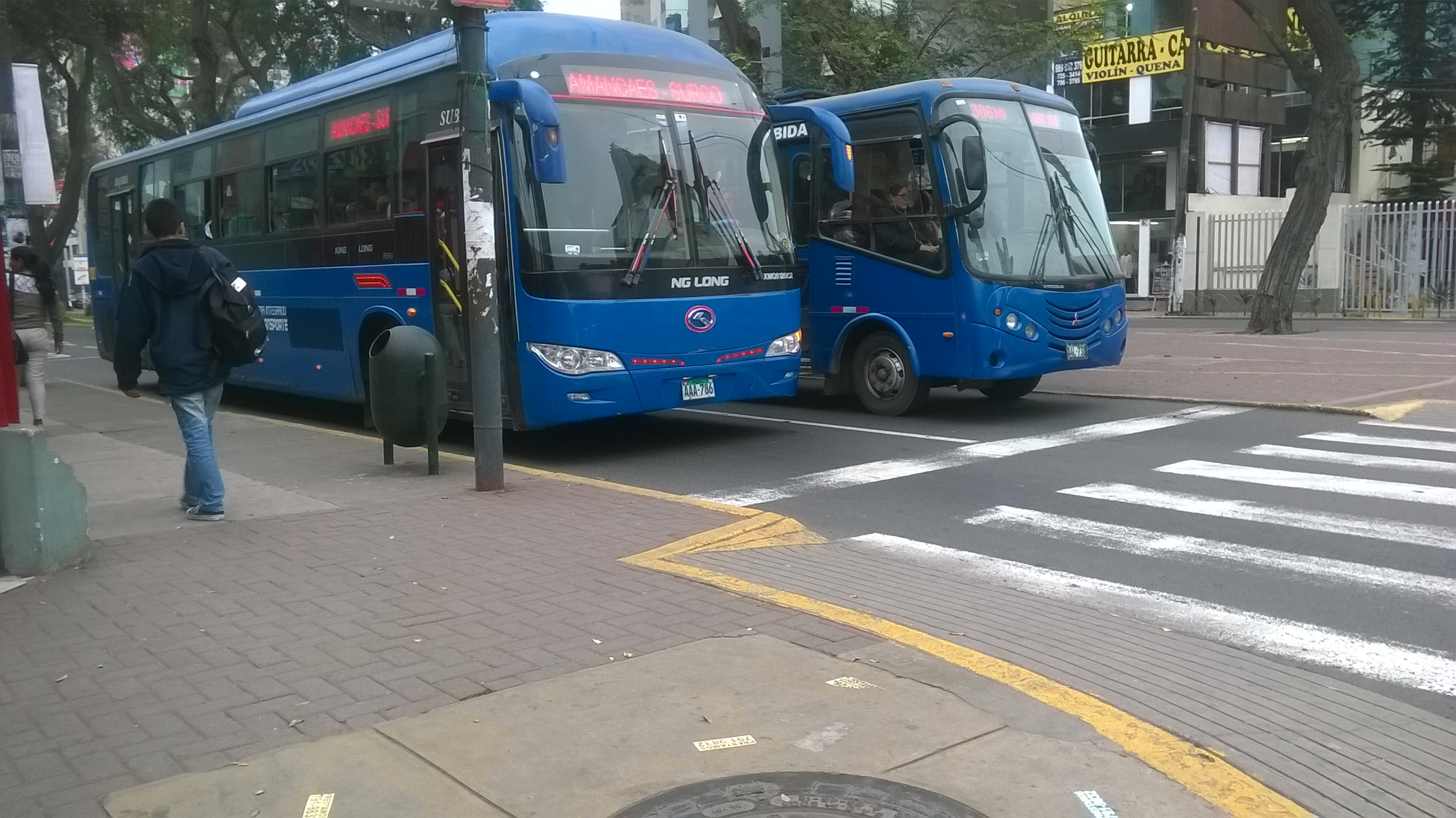 Buses del SIT en la avenida Arequipa.